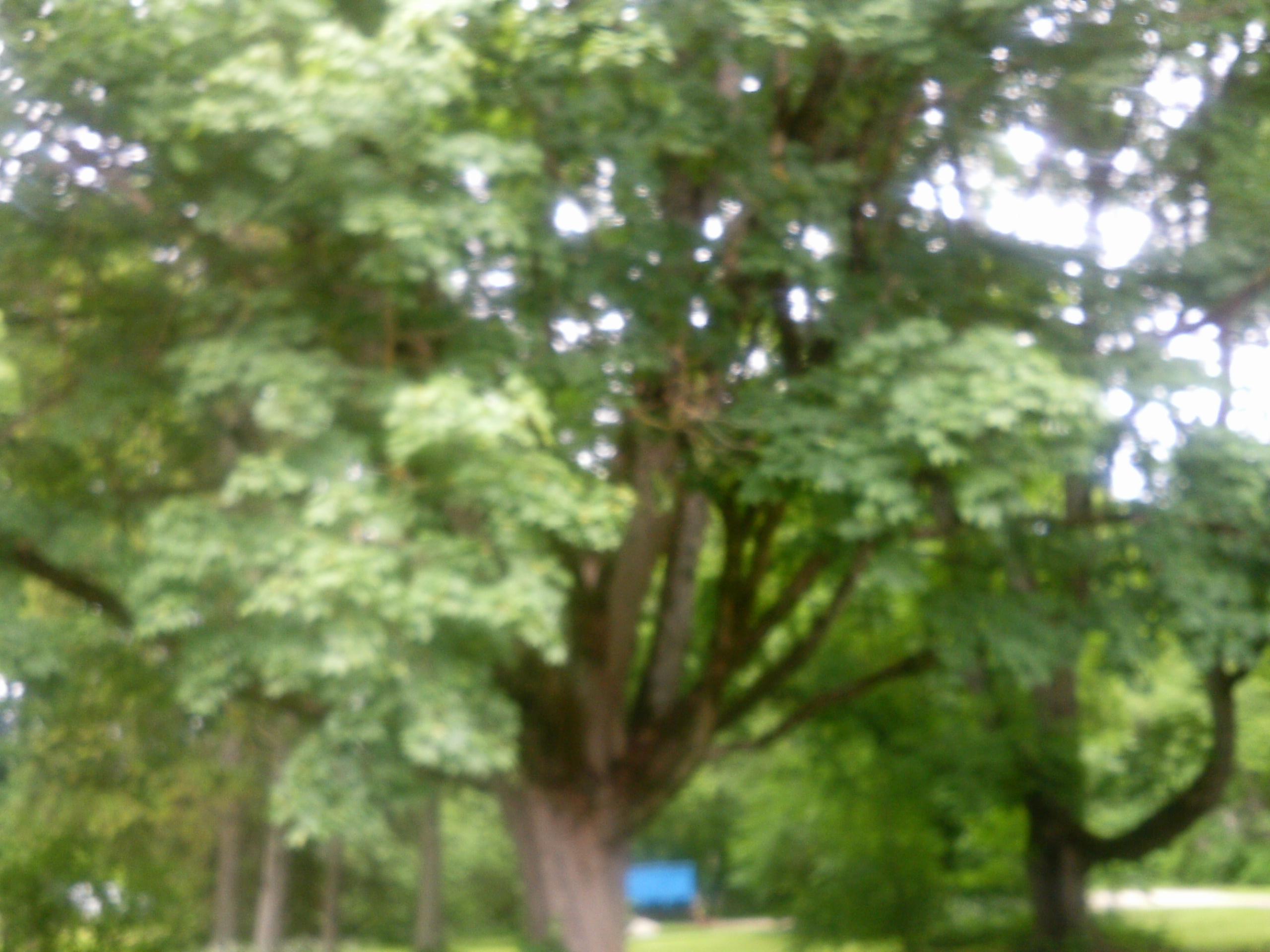 Massu mõisa park